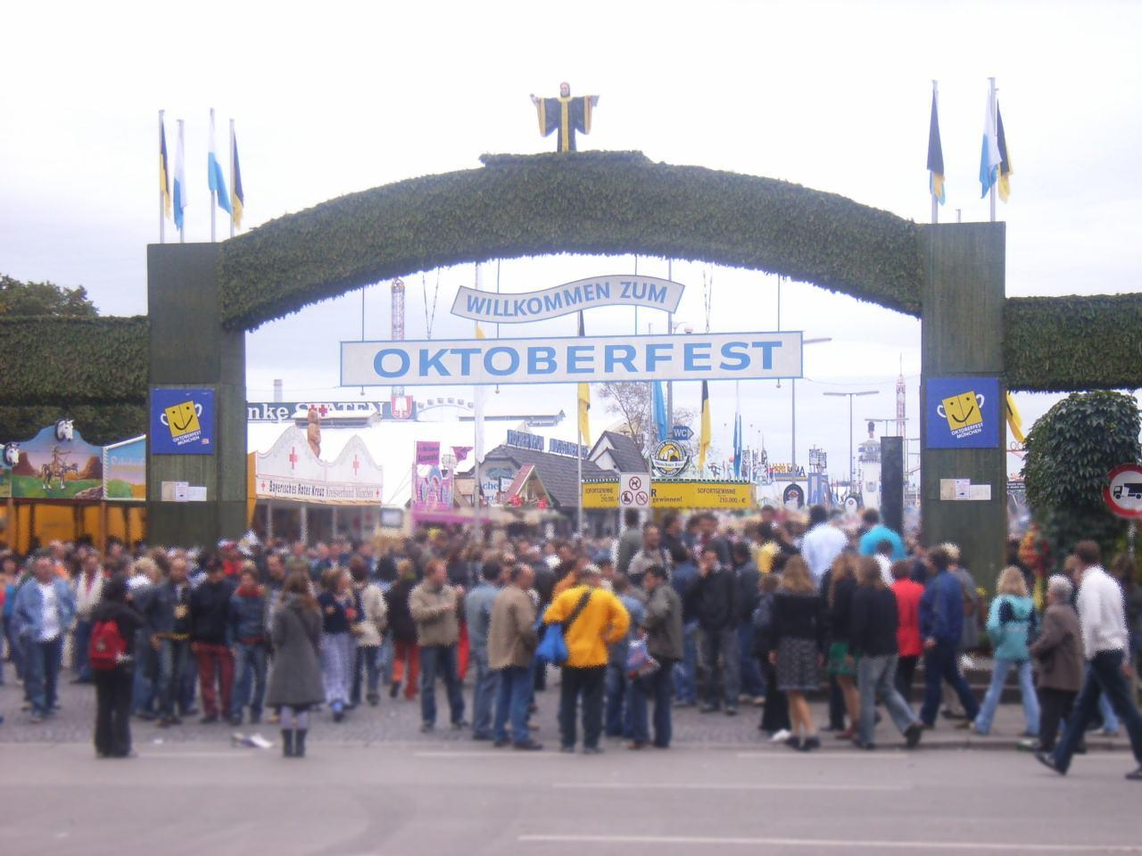 Oktoberfest, ĉefa enirejo. 2005. Malfono malklarigita pro anonimeco.